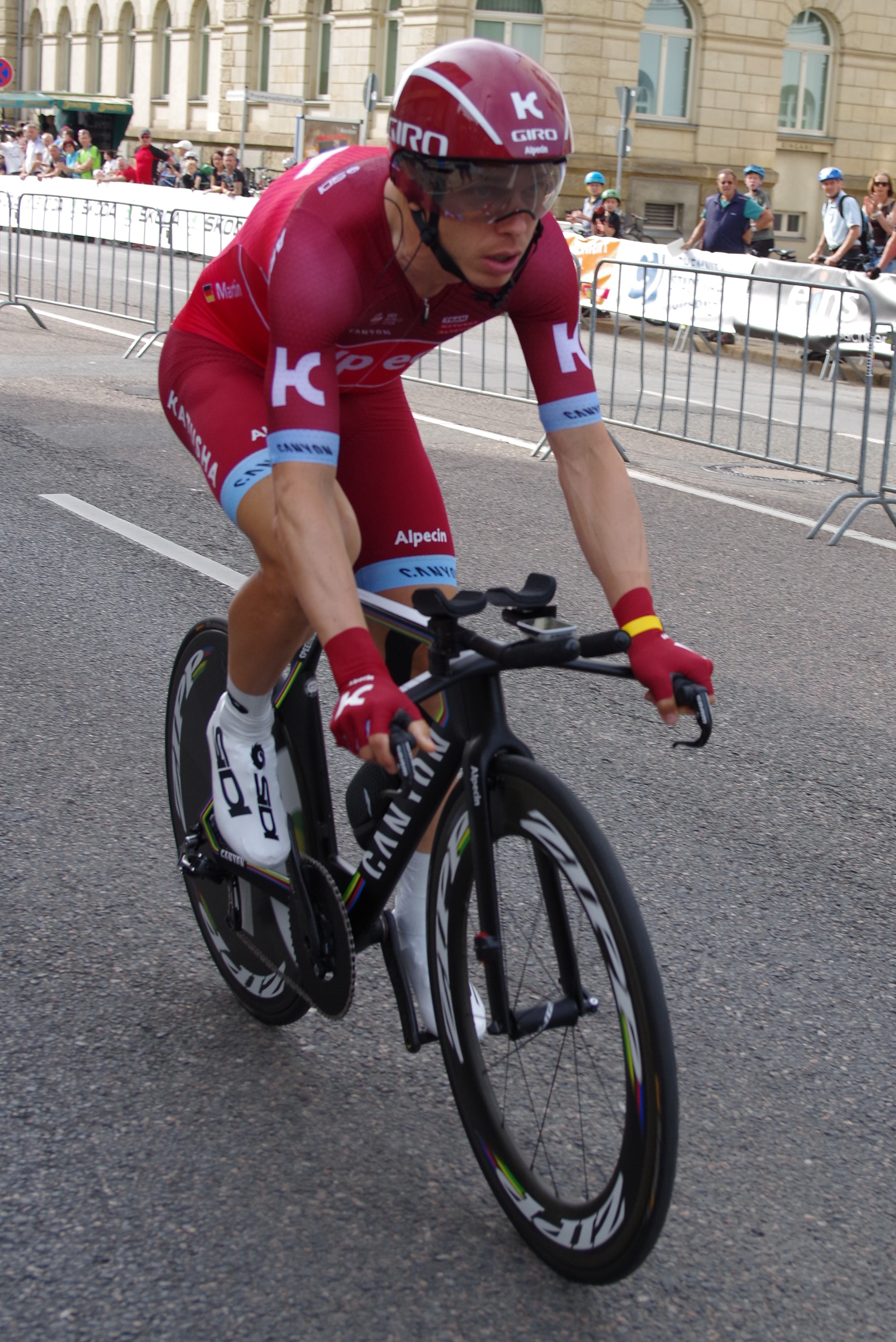 Deutsche Meisterschaften im Einzelzeitfahren 2017 23. Juni 2017 The making of this document was supported by the Community-Budget of Wikimedia Germany.